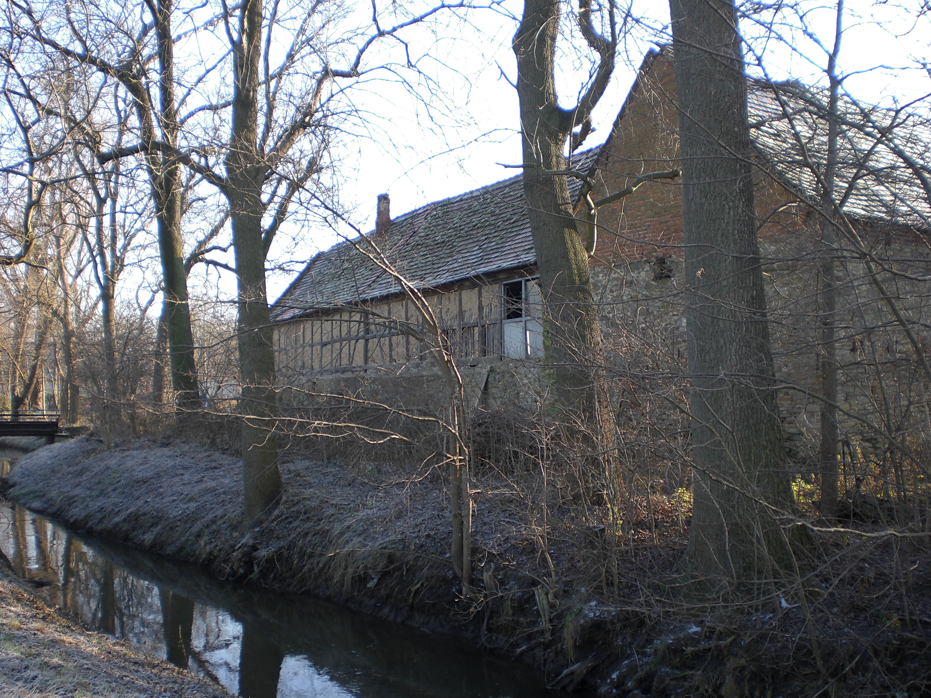 Sohlener Mühle, Magdeburg, ehemalige Wassermühle, Bach Sülze im Vordergrund